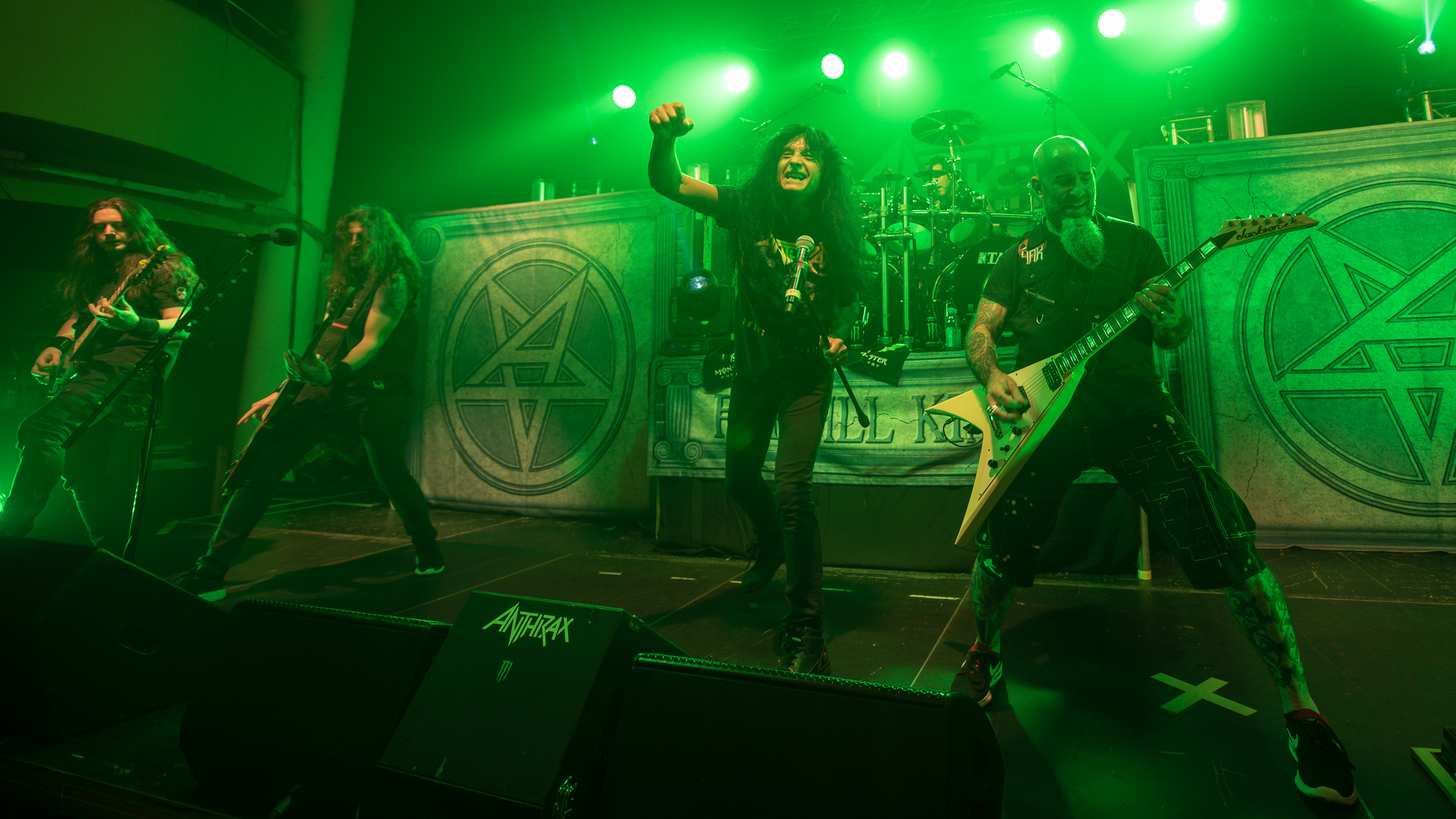 Anthrax,Frank Bello,Joey Belladonna,Jonathan Donais,Joseph Anthony Bellardini,Konzert,Livekonzert,Livemusik,Löwensaal,Manfred Hertlein Veranstaltungs GmbH,Musik,Scott Ian